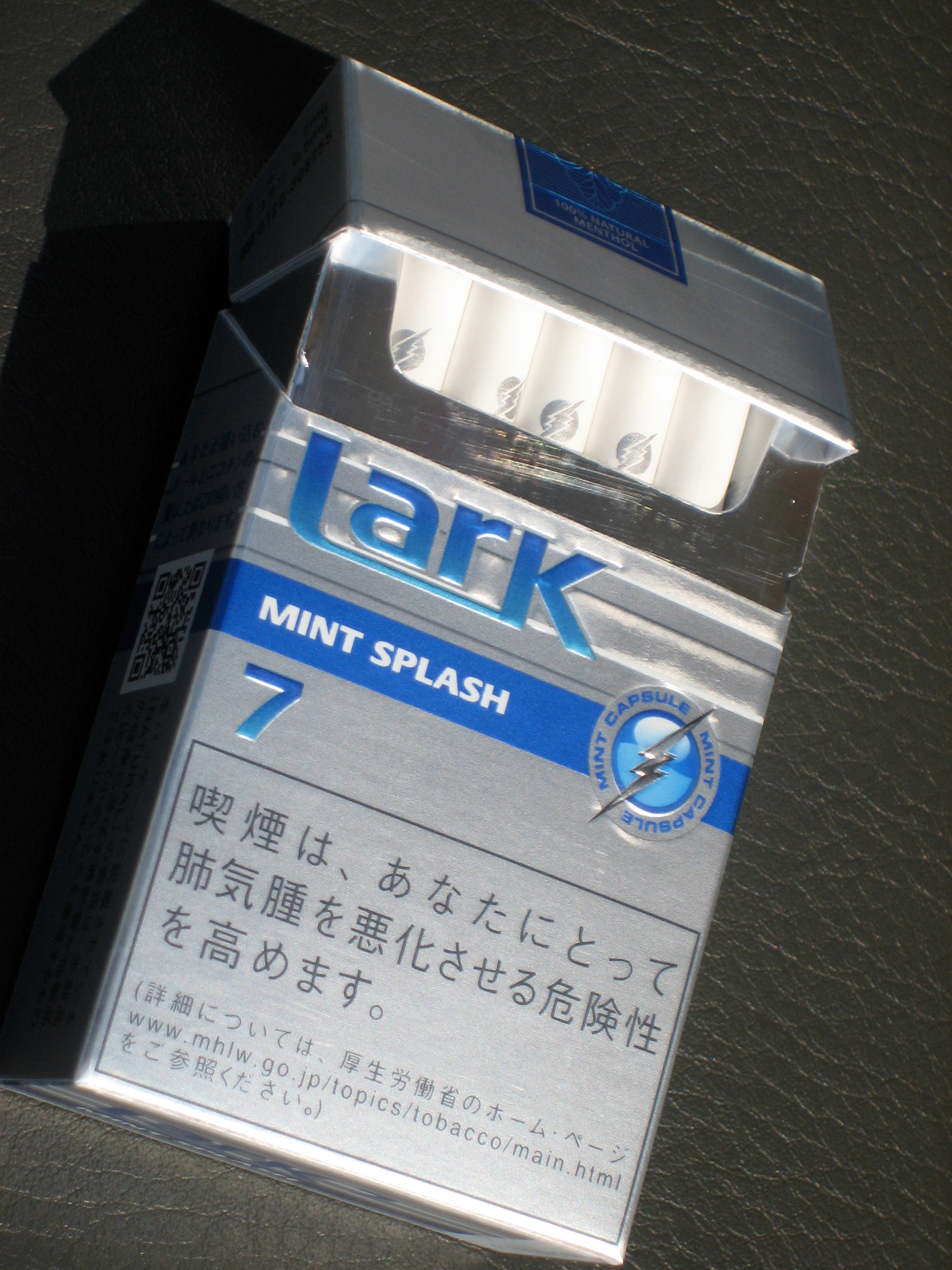 国道372号沿いおよび近辺にあるさまざまな建物など。 ラーク・ミントスプラッシュ。